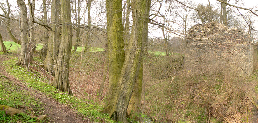 Ruine der Wasserburg Langeleben